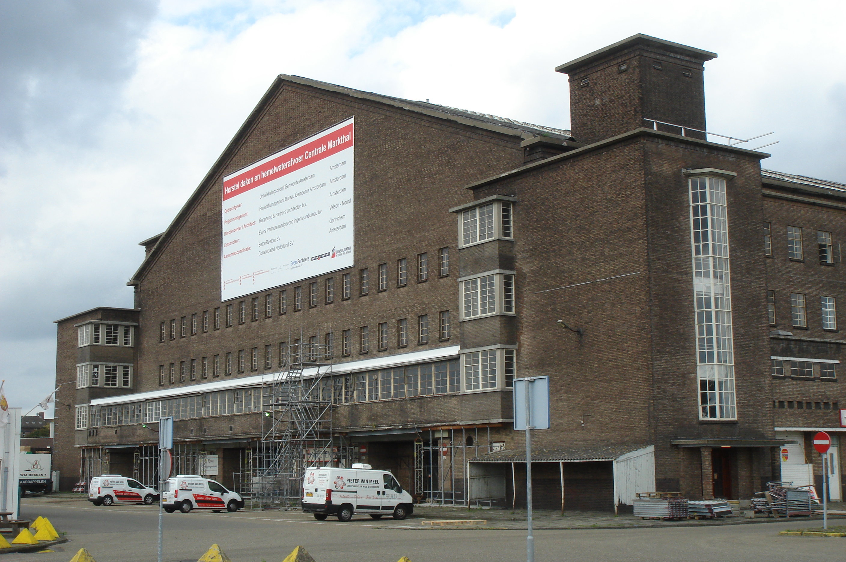 Centrale markthal, Jan van Galenstraat 4, Amsterdam (11 september 2011)